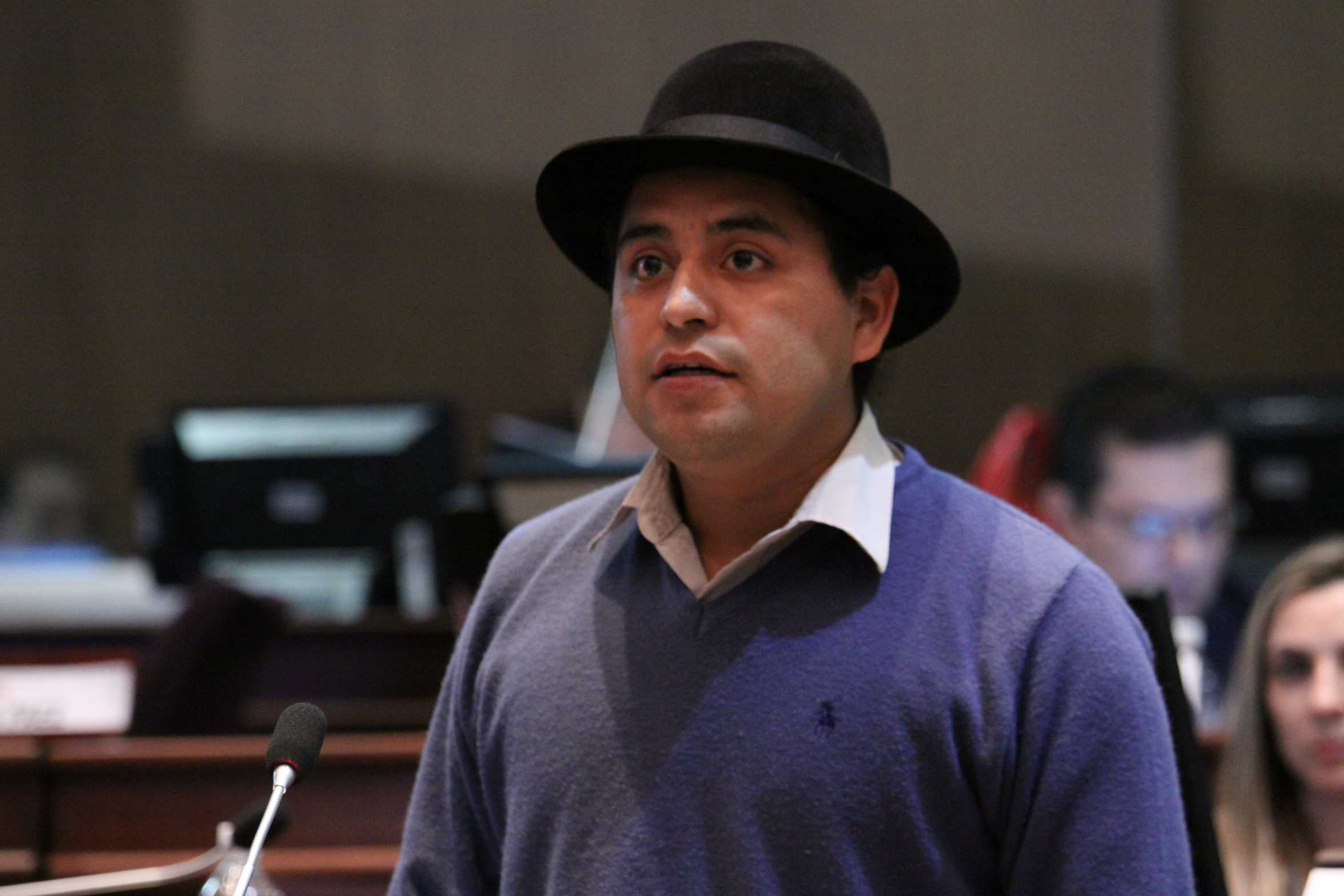 05 marzo de 2015.- Proyecto de Resolución mediante el cual la Asamblea Nacional hace un llamado a las autoridades judiciales a evitar la impunidad en el caso del asesinato del Diputado Jaime Hurtado González y sus acompañantes. Fotografía: Hugo Ortiz / Asamblea Nacional